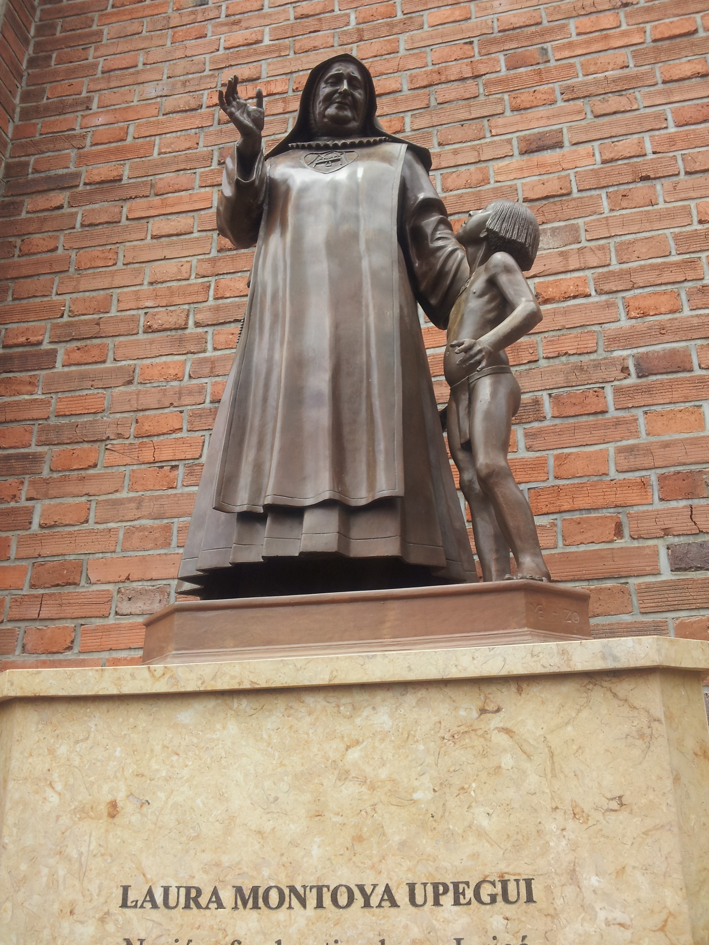 Monumento en honor a Santa Laura Montoya Upegui en Jericó